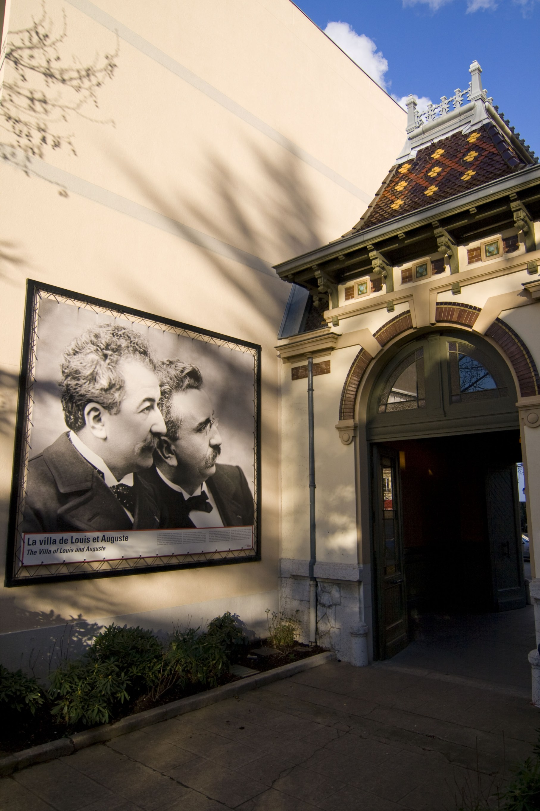 Institut lumière, Lyon, quartier Montplaisir